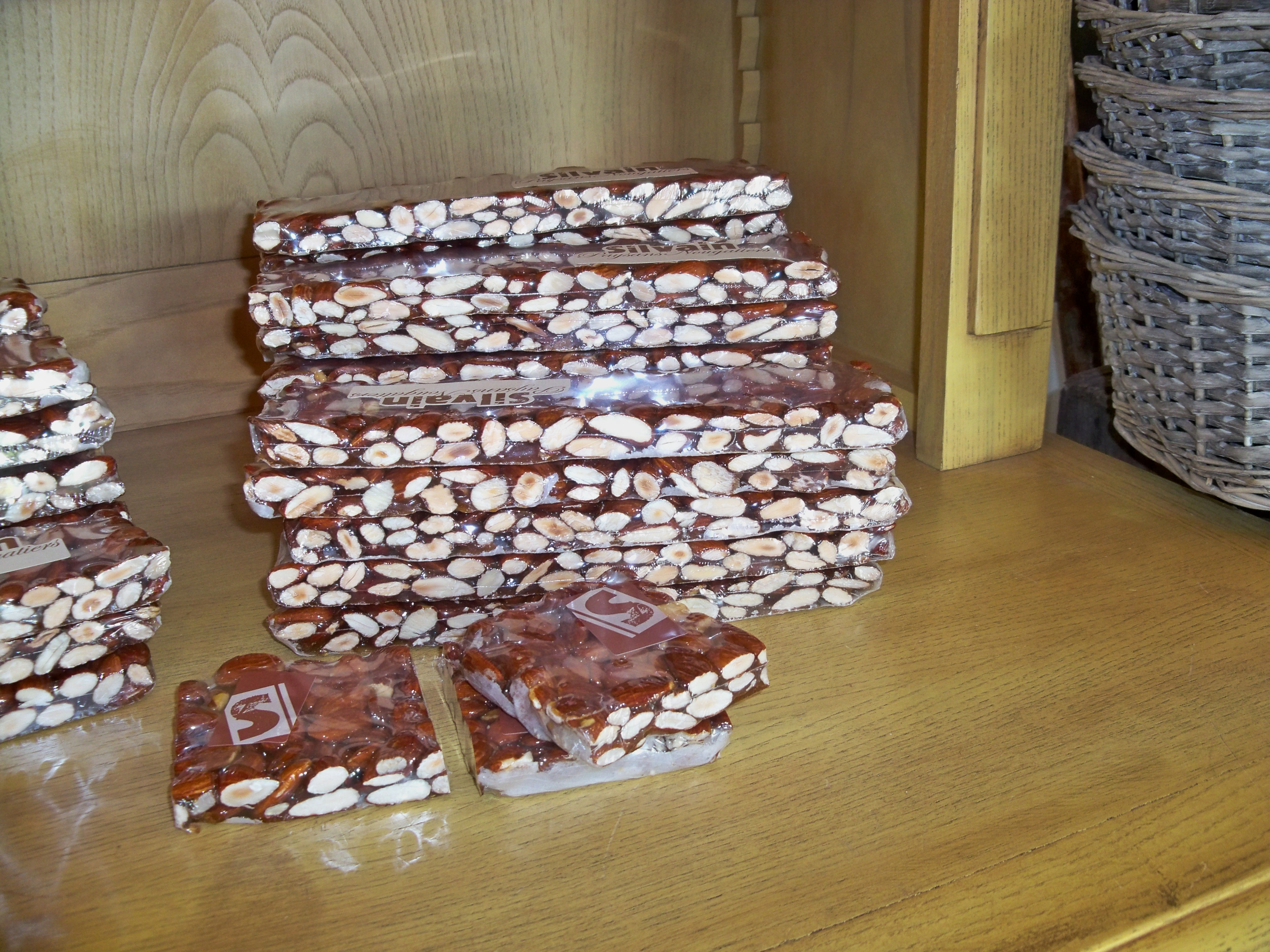 Nougat noir de Saint Didier, Vaucluse, France